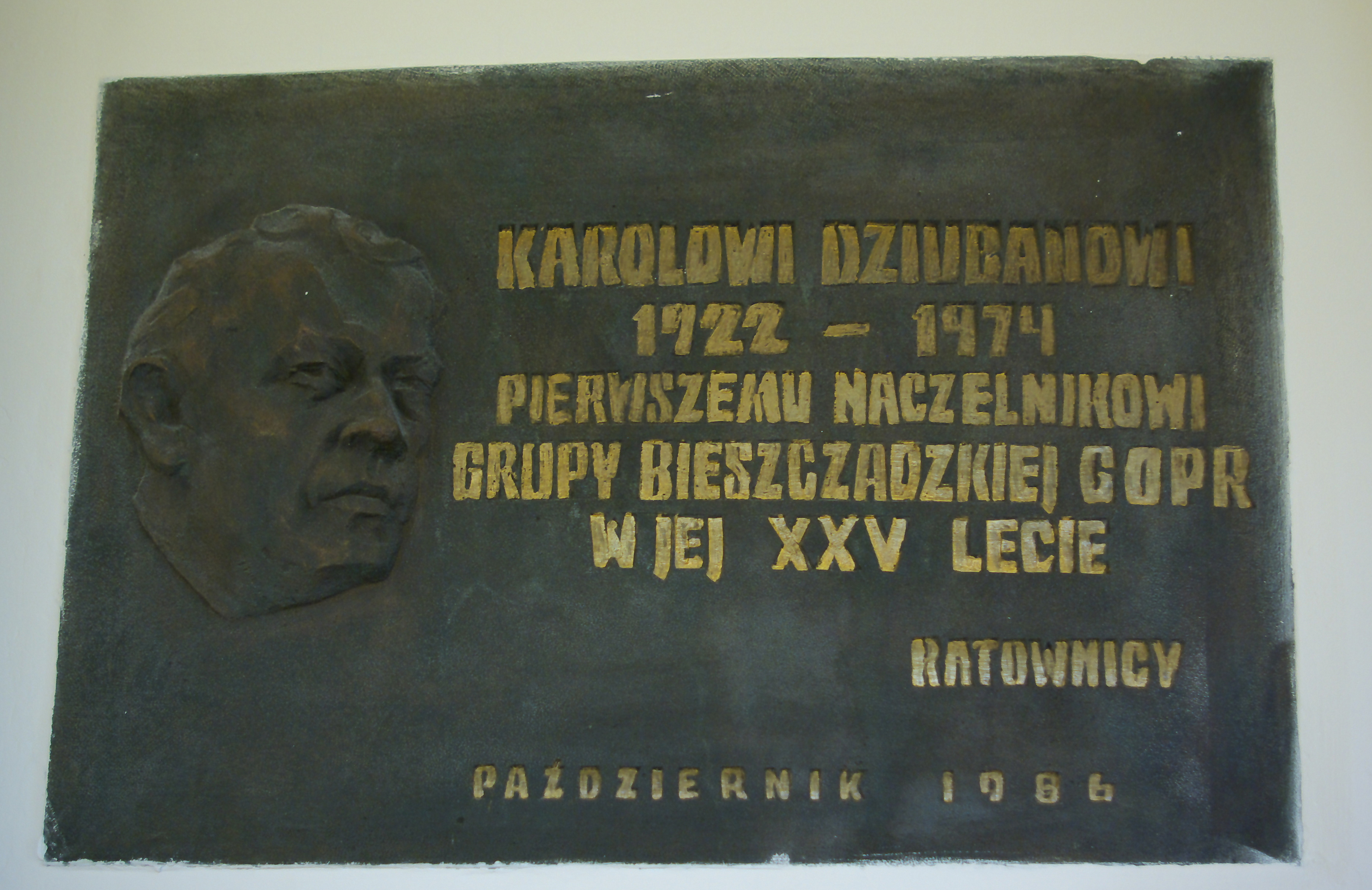 Budynek bursy przy ulicy Mickiewicza 49 w Sanoku. Tablica poświęcona Karolowi Dziubanowi